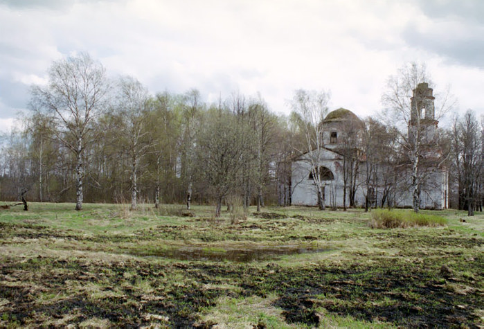 Месторасположение здания земского народного училища (начальной школы).